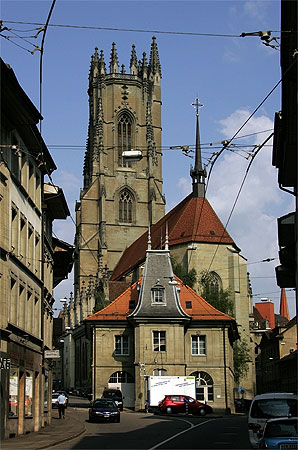 Fribourg / Freiburg: Kathedrale Sankt Nicolas